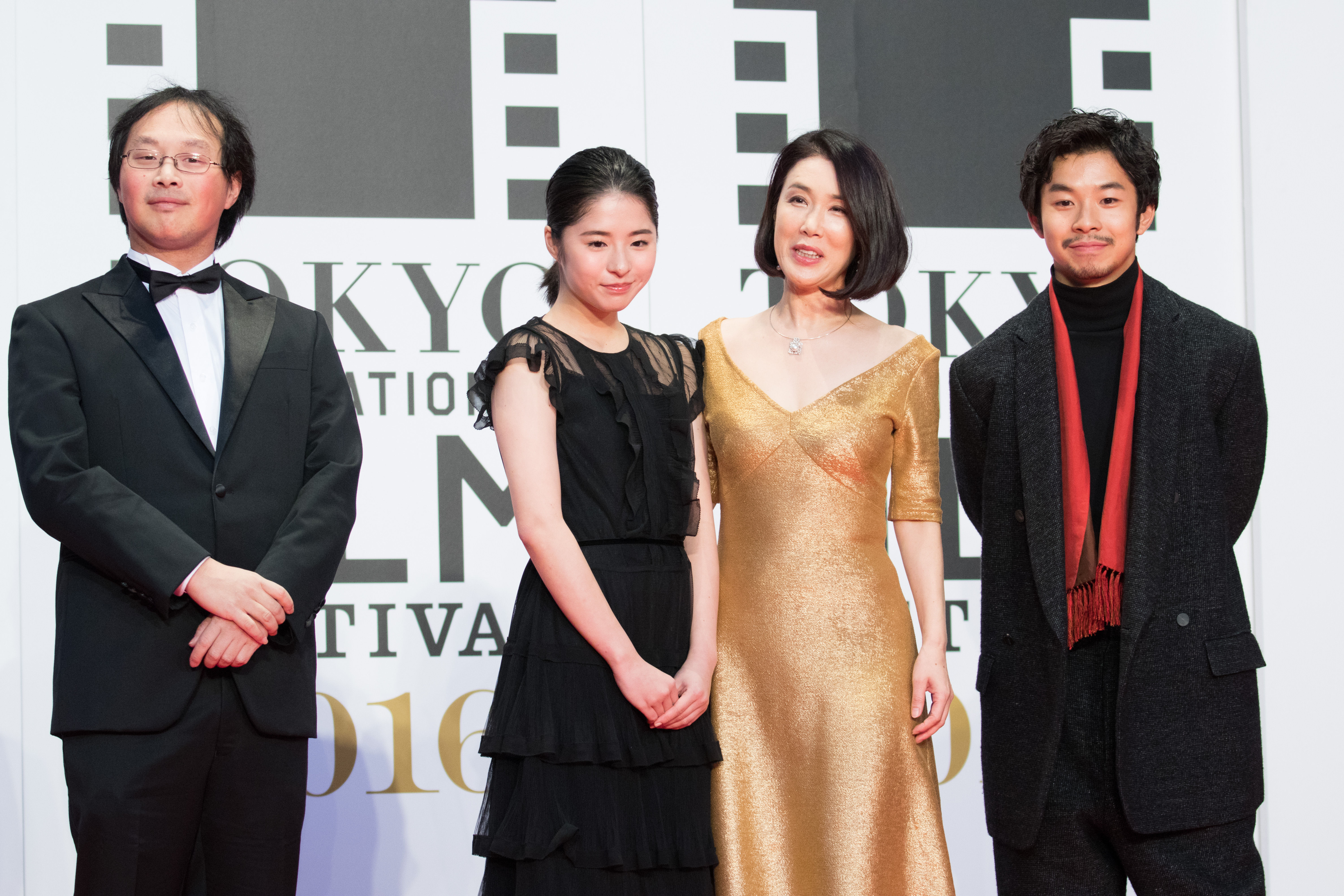 第29回 東京国際映画祭 オープニングセレモニー 深田晃司 真広佳奈 筒井真理子 太賀 (淵に立つ)